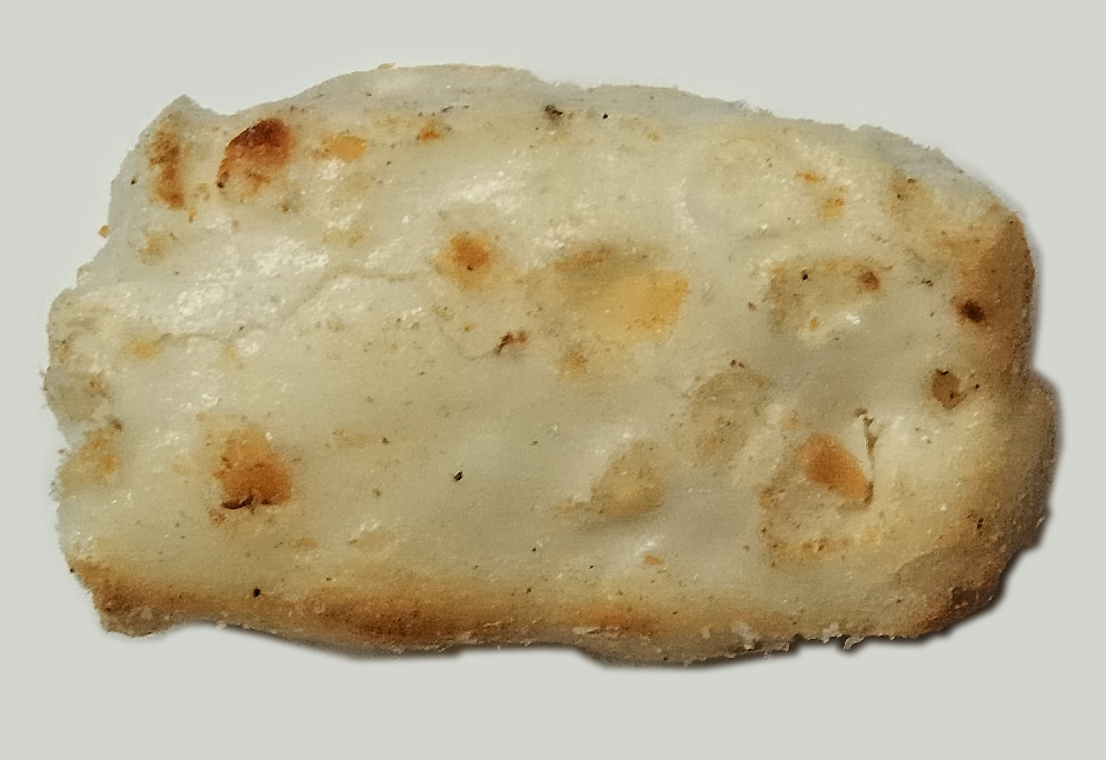 Beika (米菓)